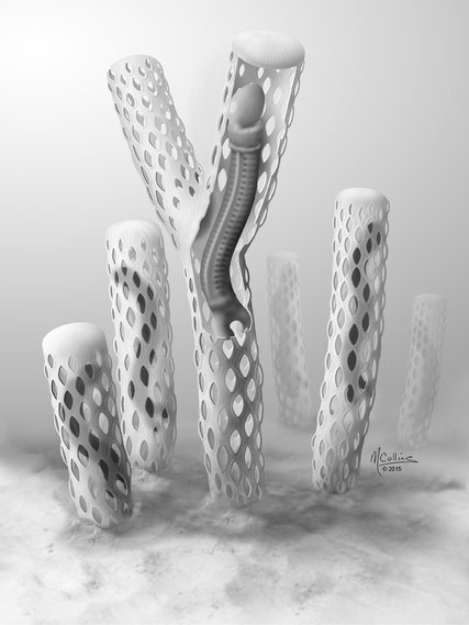 tube chitineux d'oesia disjuncta